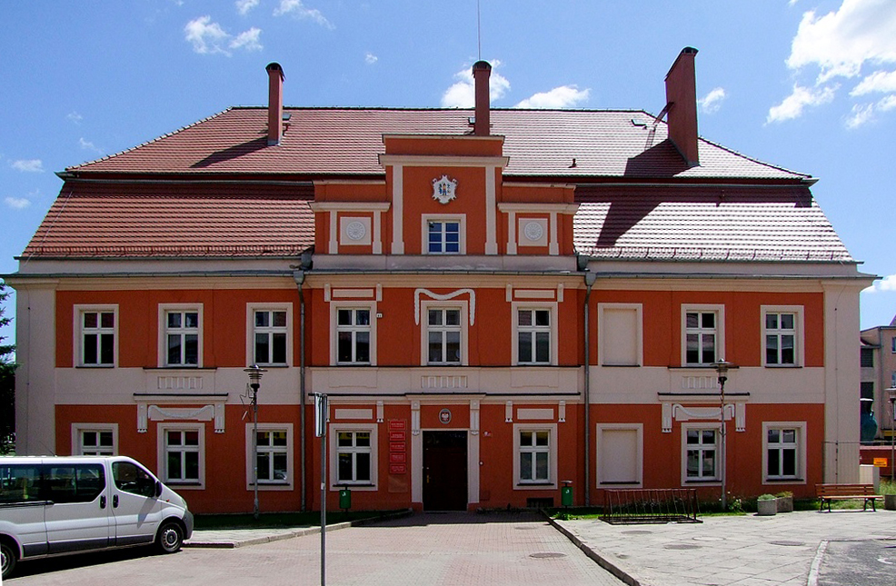 Nowogrodziec - ratusz, 1795, 1880